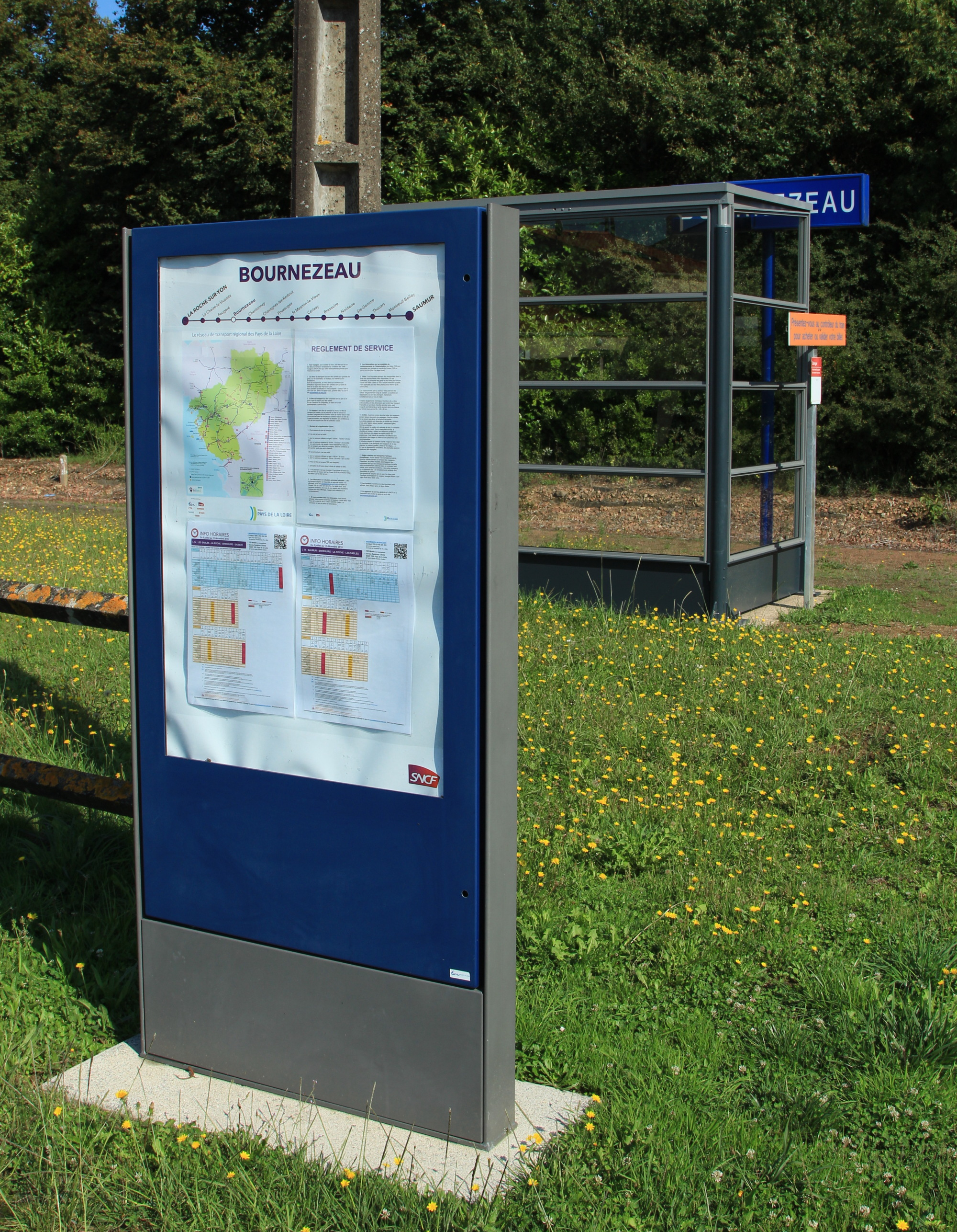 Détail du panneau informatif de la gare de Bournezeau en Vendée.